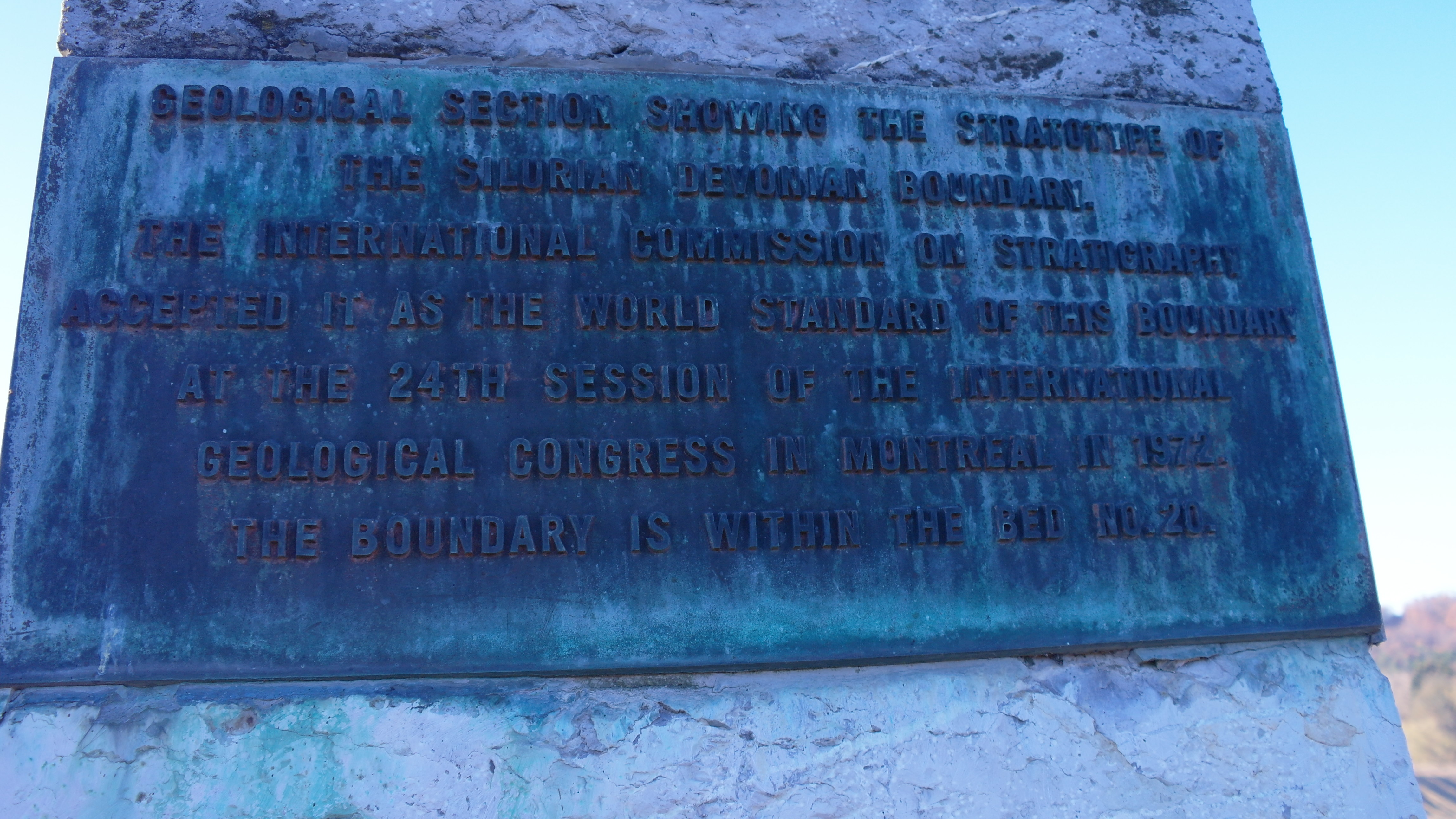 Deska památníku na Klonku u Suchomast